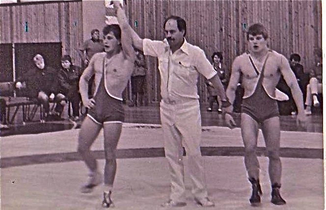 1989. aasta Eesti absoluutsetel meistrivõistlused Kreeka-Rooma maadluses kehakaalus 68 kg. On tõstetud käsi Feliks Pressil, märkimaks võitu Valeri Nikitini üle.